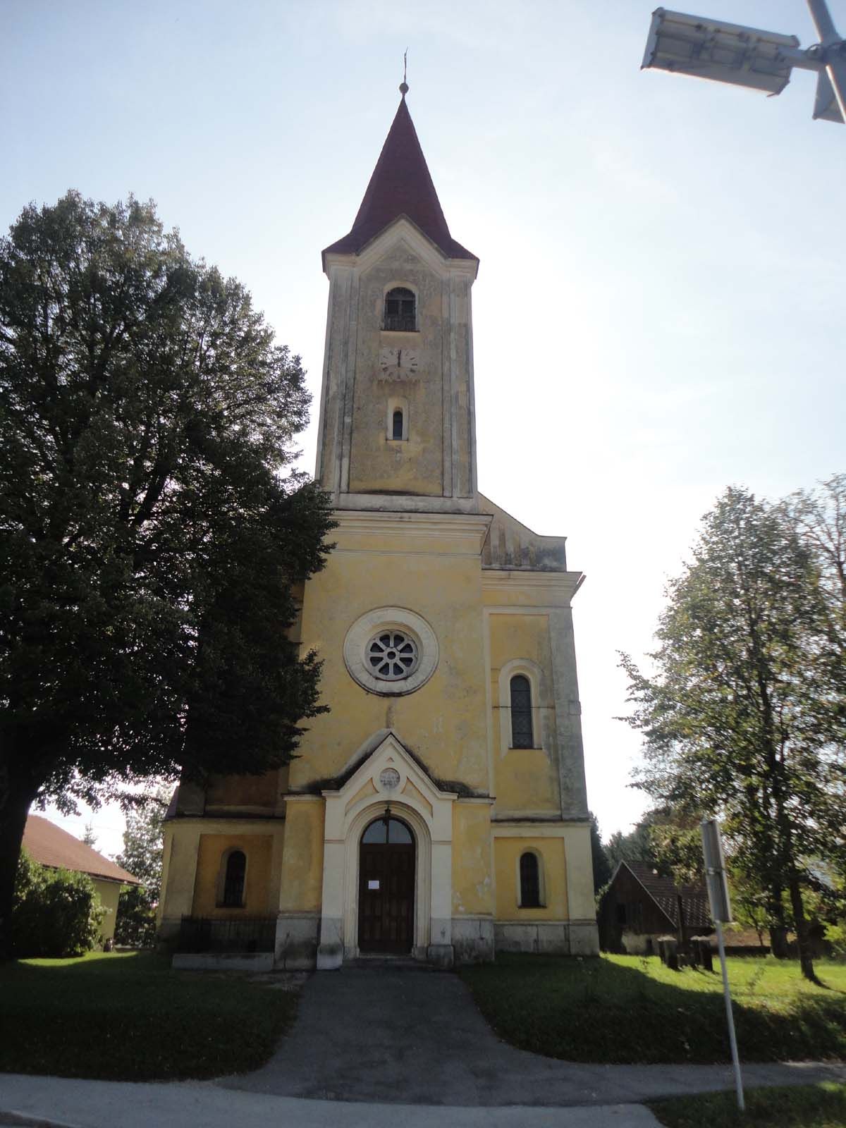 Stara Cerkev pri Kočevju: cerkev